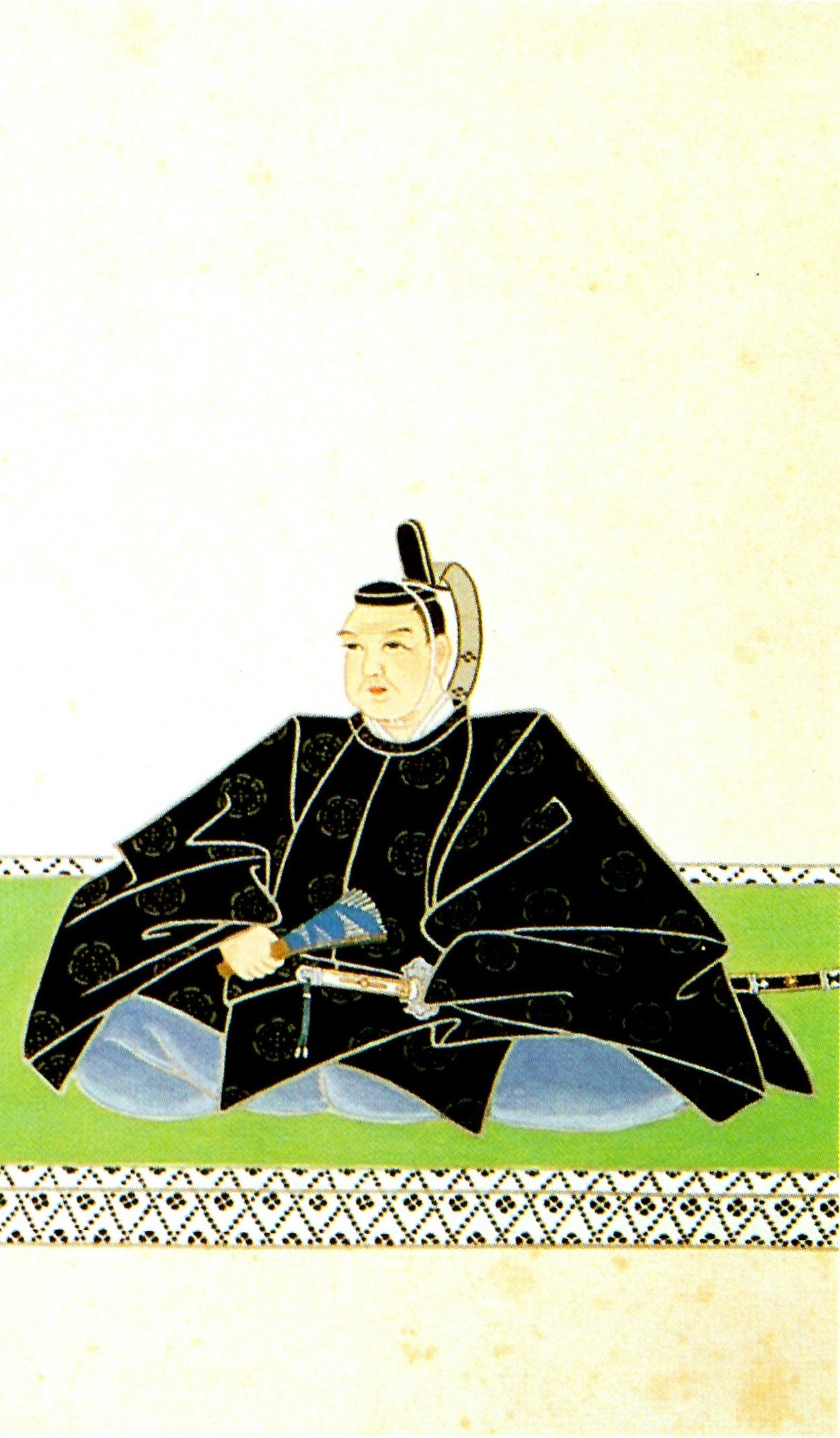 戸田氏定の肖像。